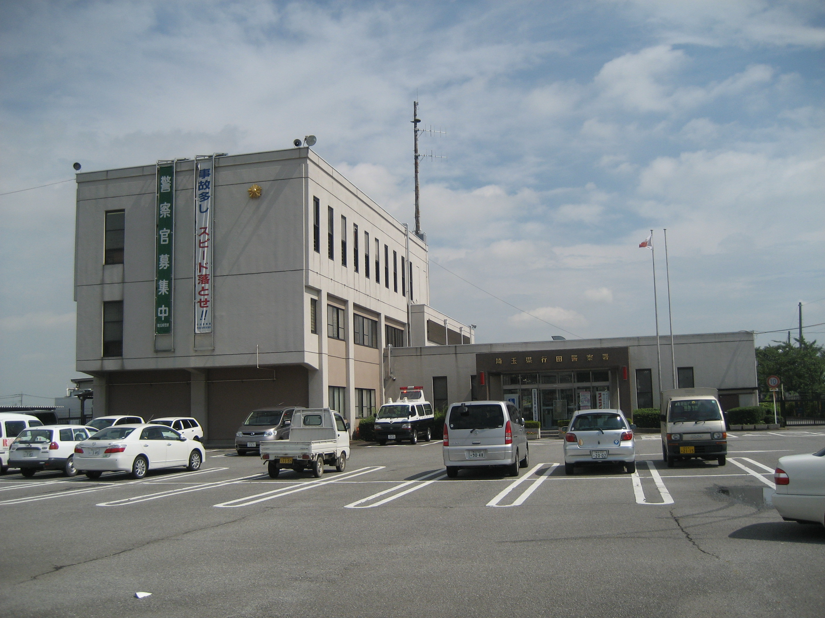 埼玉県警察行田警察署庁舎